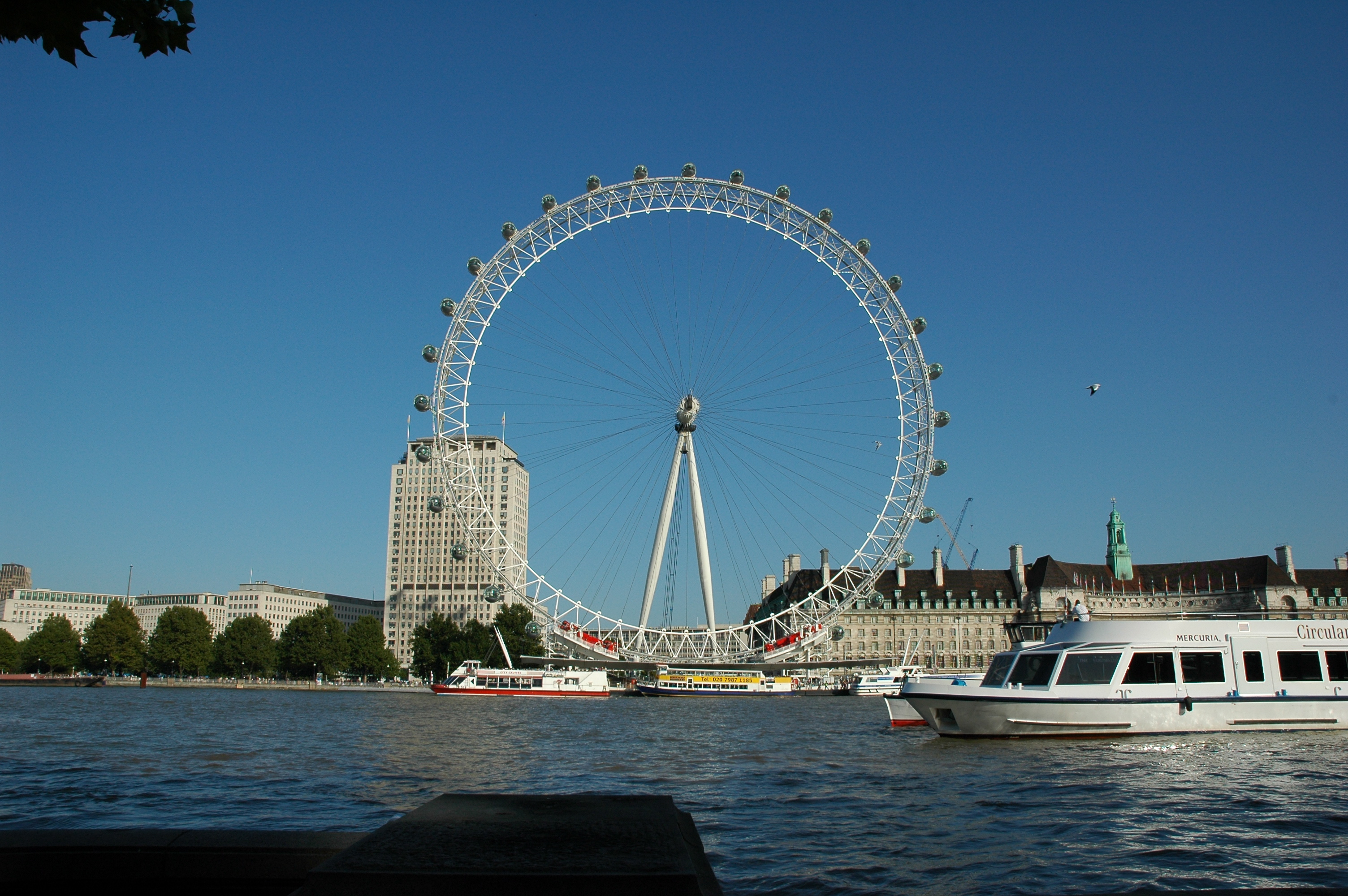 London Eye.